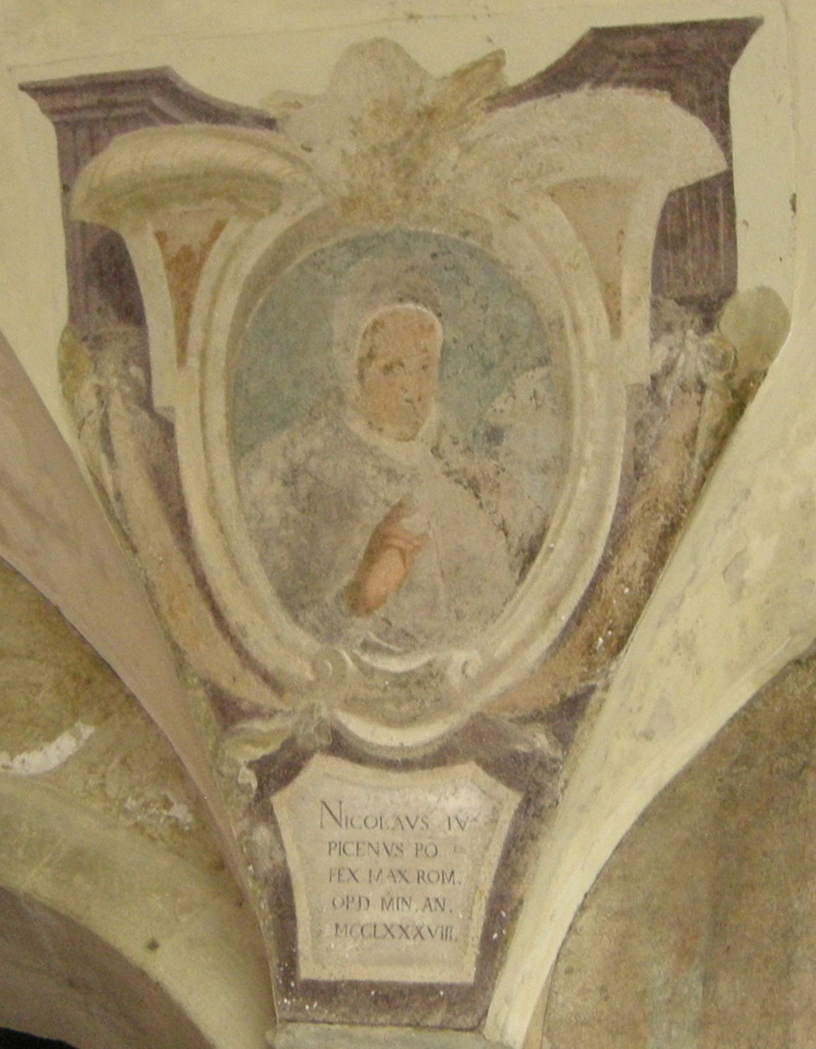 Chiostro di ognissanti, personalità francescane 01 niccolò IV